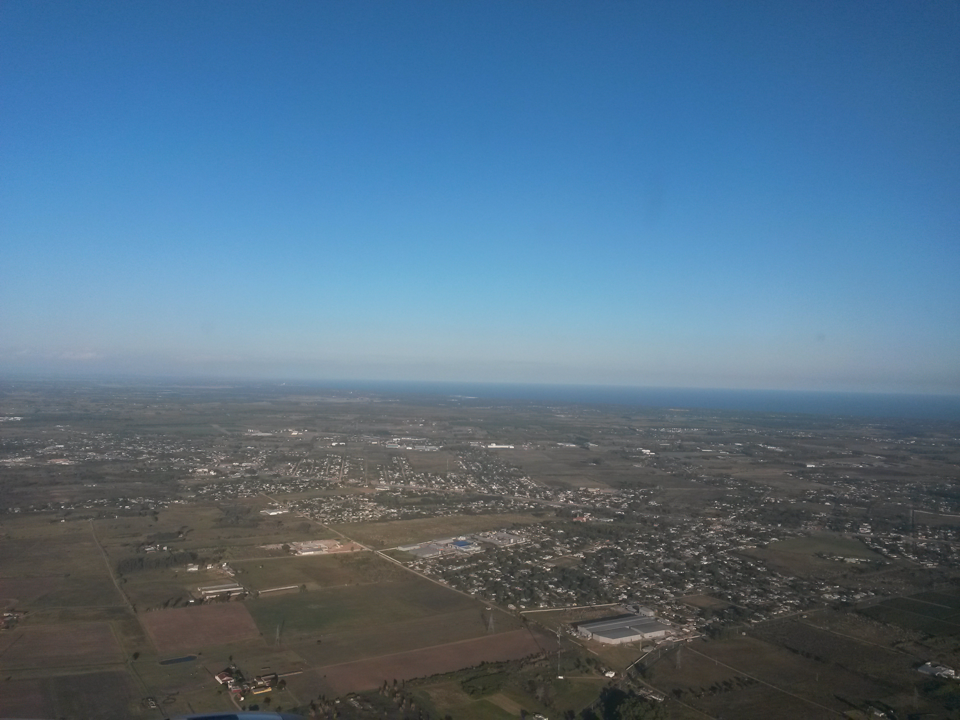 Vista aérea parcial de la ciudad de Barros Blancos